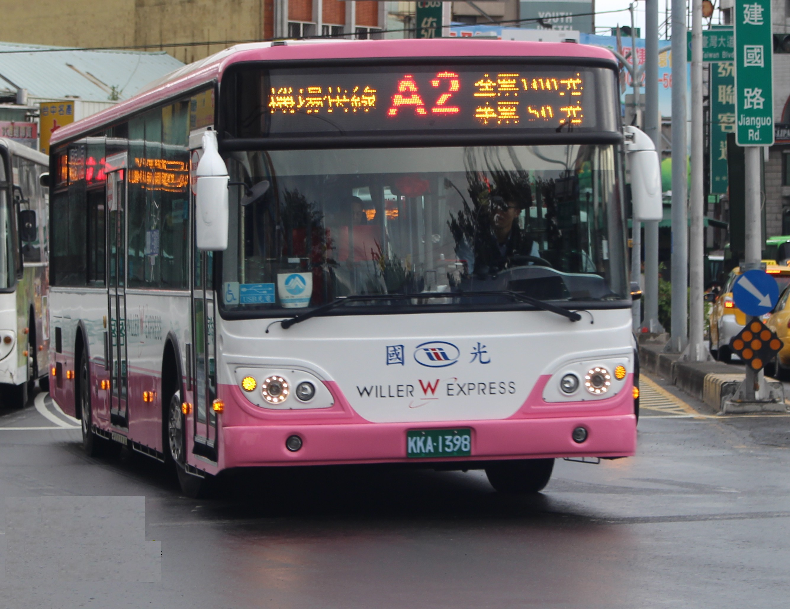 國光客運 成運汽車MB120NS KKA-1398 A2